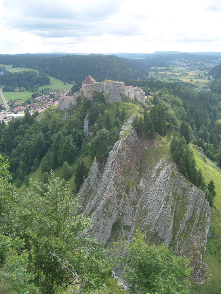 La Cluse-et-Mijoux, château de Joux vu depuis le fort Mahler du Larmont inférieur